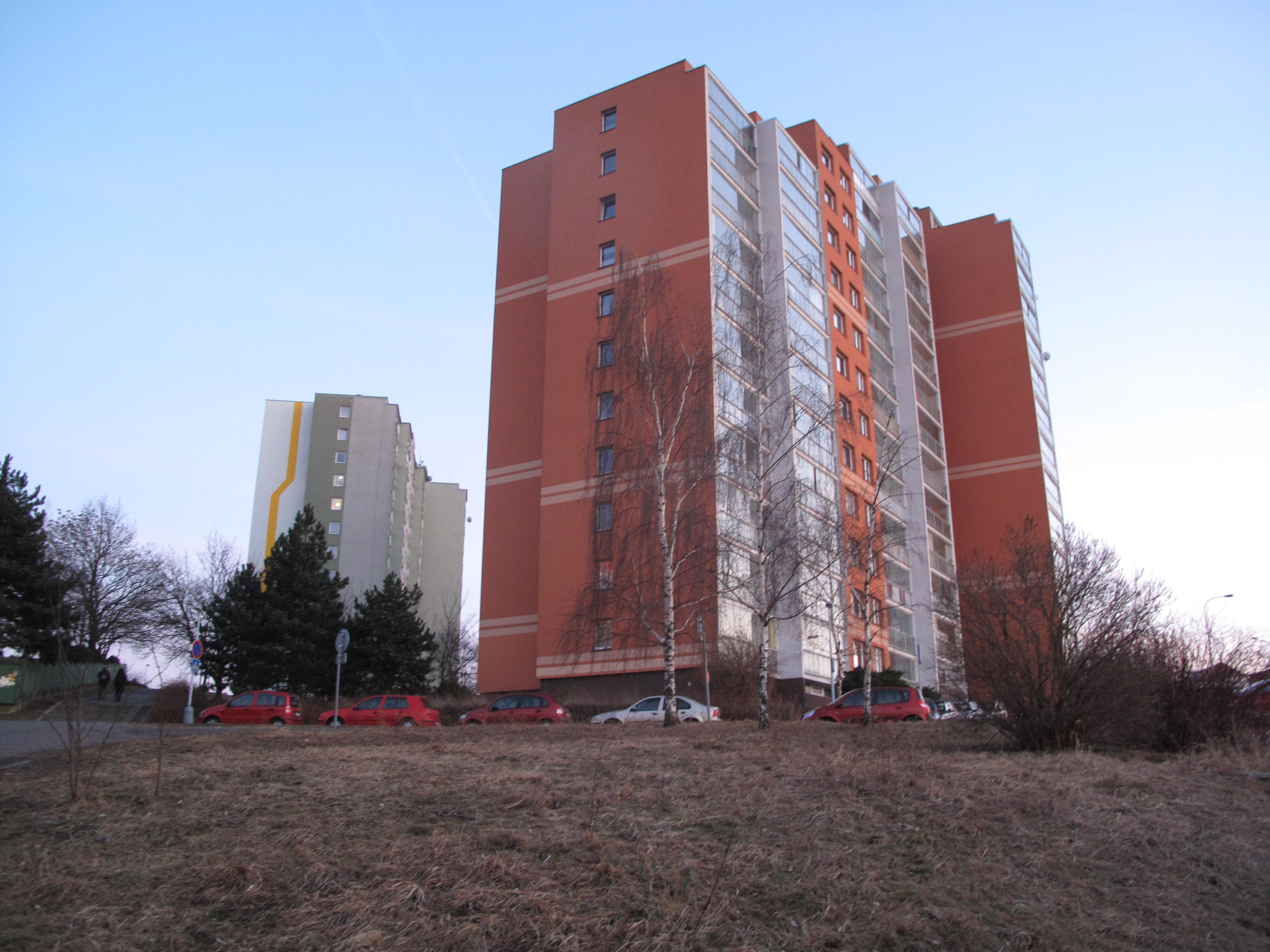 Česky: Praha-Hloubětín, sídliště Lehovec, Slévačská 902/11, přes Vizírskou, vlevo vzadu Kukelská 903/1.